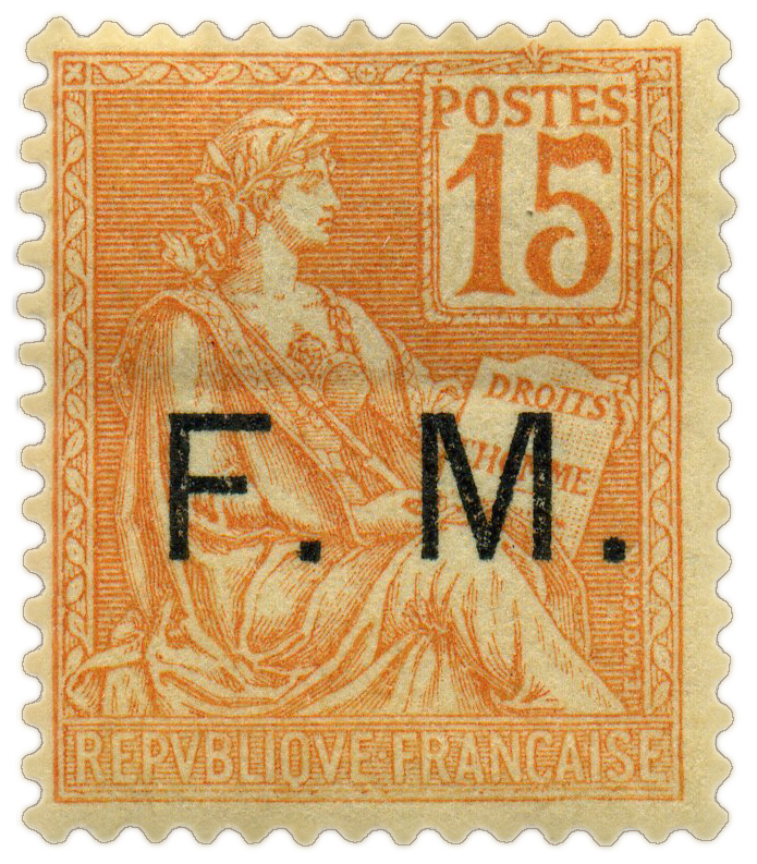 1ère Franchise militaire type Mouchon